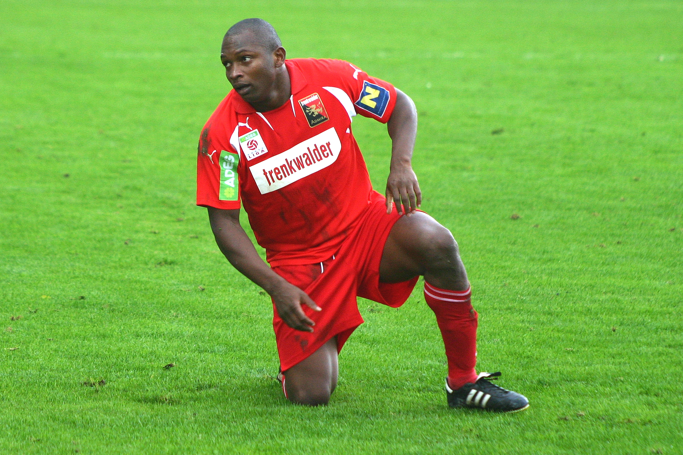 Froylan Ledezma – Trenkwalder Admira Wacker